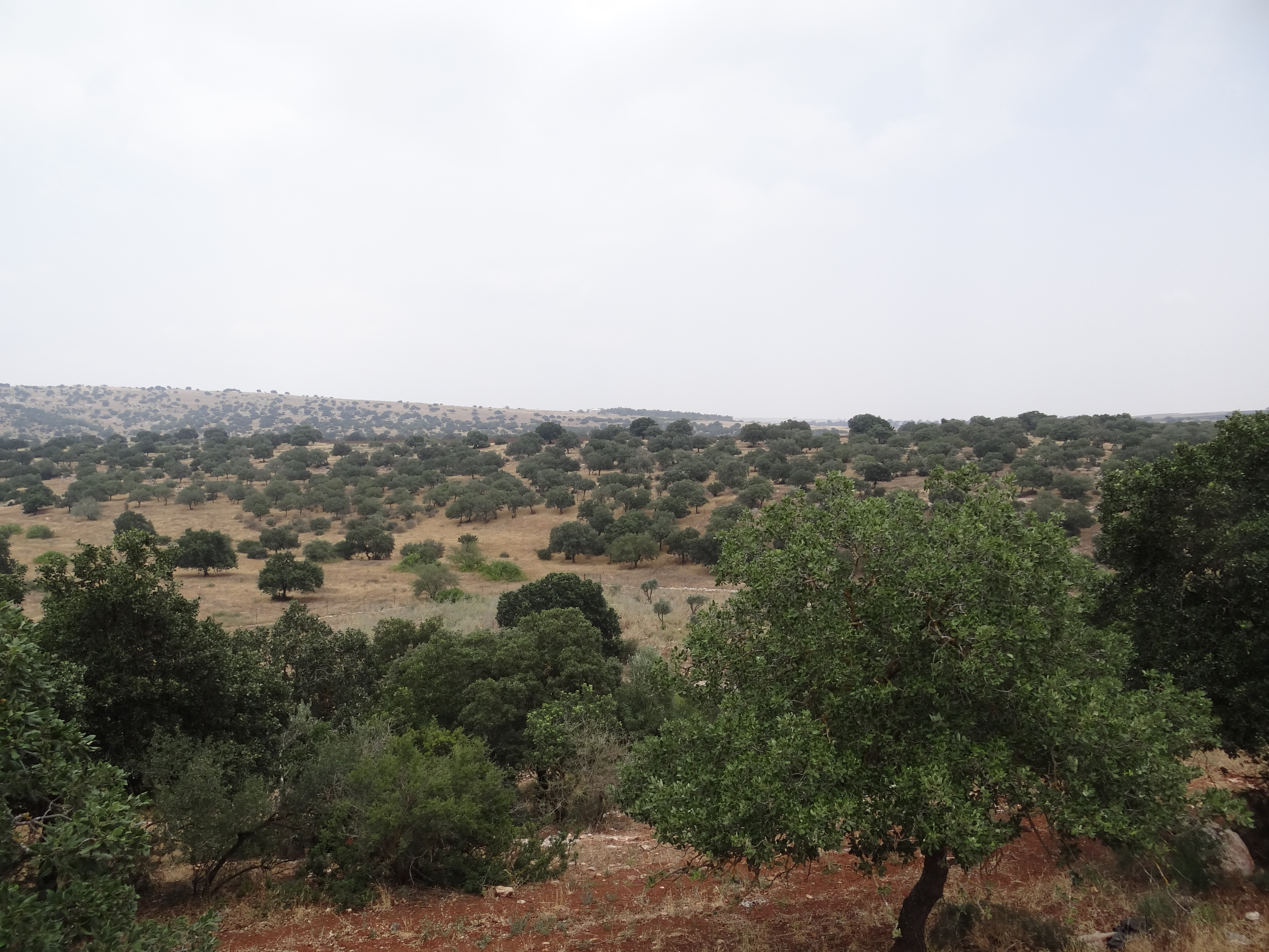 שמורת אלוני בית קשת היא שמורת טבע מוצעת של עצי אלון התבור המשתרעת על פני שטח של 5,054 דונם במורדות המזרחיים של הרי נצרת. ממערב מצפון ומדרום לקיבוץ בית קשת.